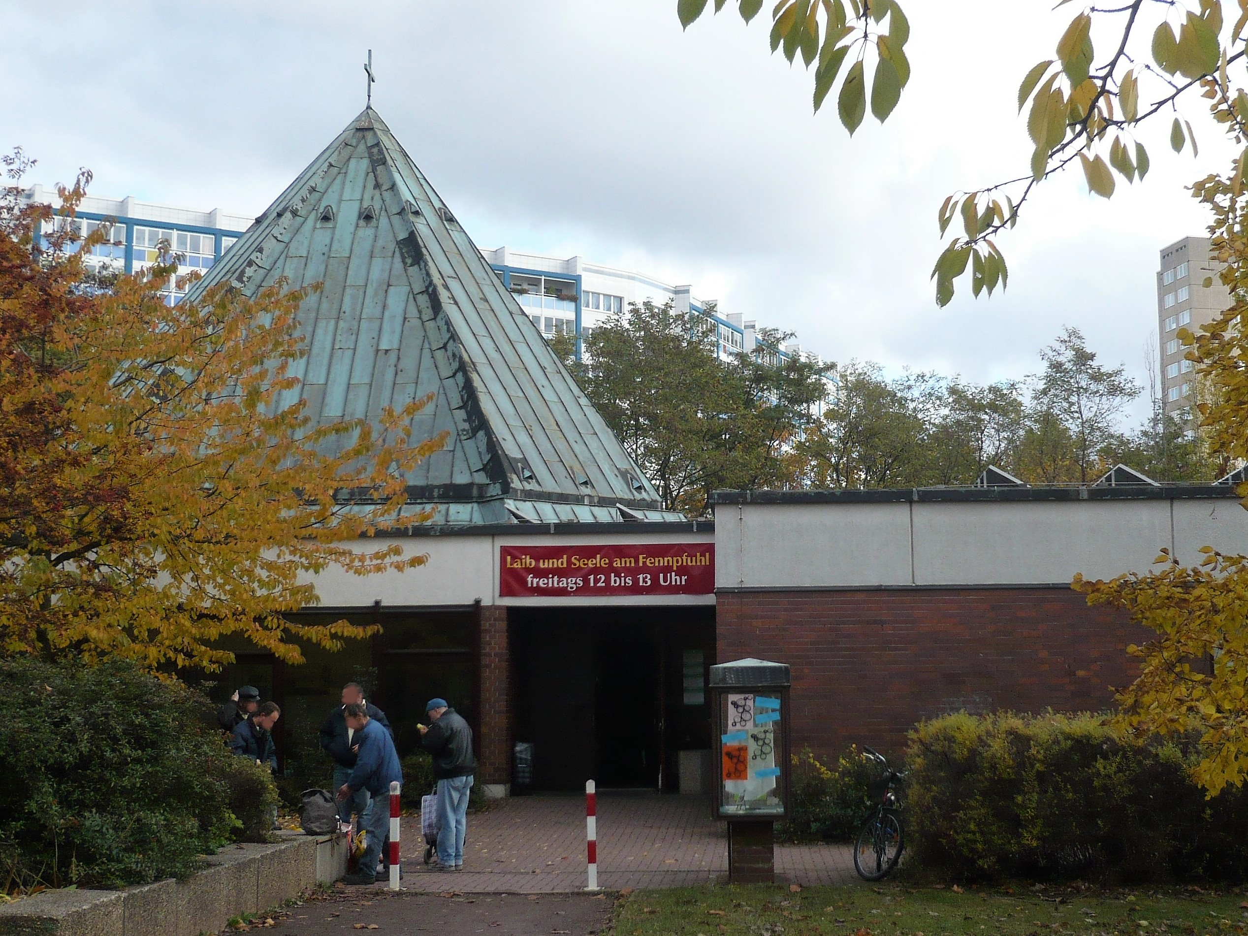 evangel. Gemeindezentrum Fennpfuhl: Aktion Laib und Seele